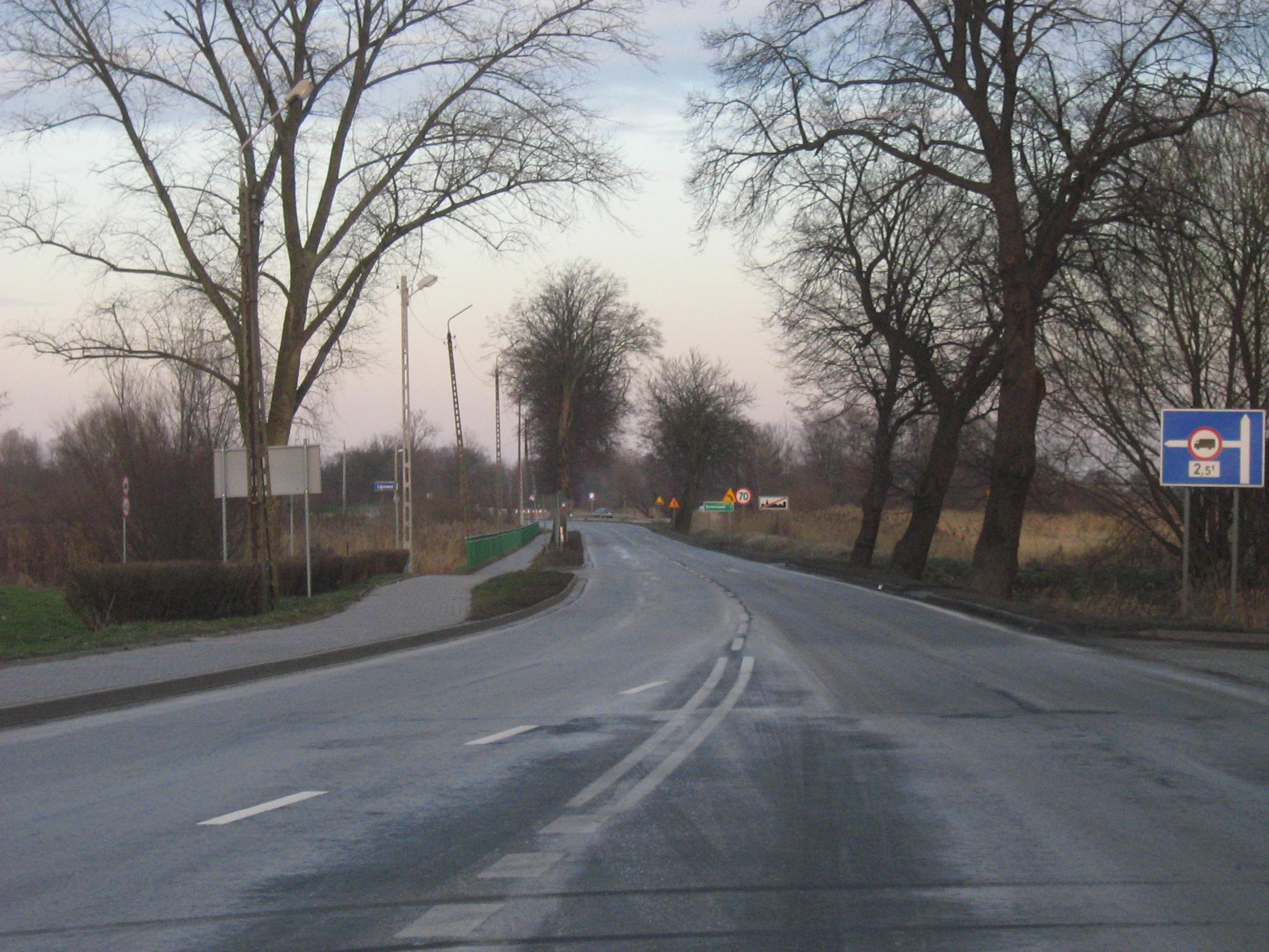 Droga wojewódzka nr 107 w Kamieniu Pomorskim. Widok w kierunku Dziwnówka.